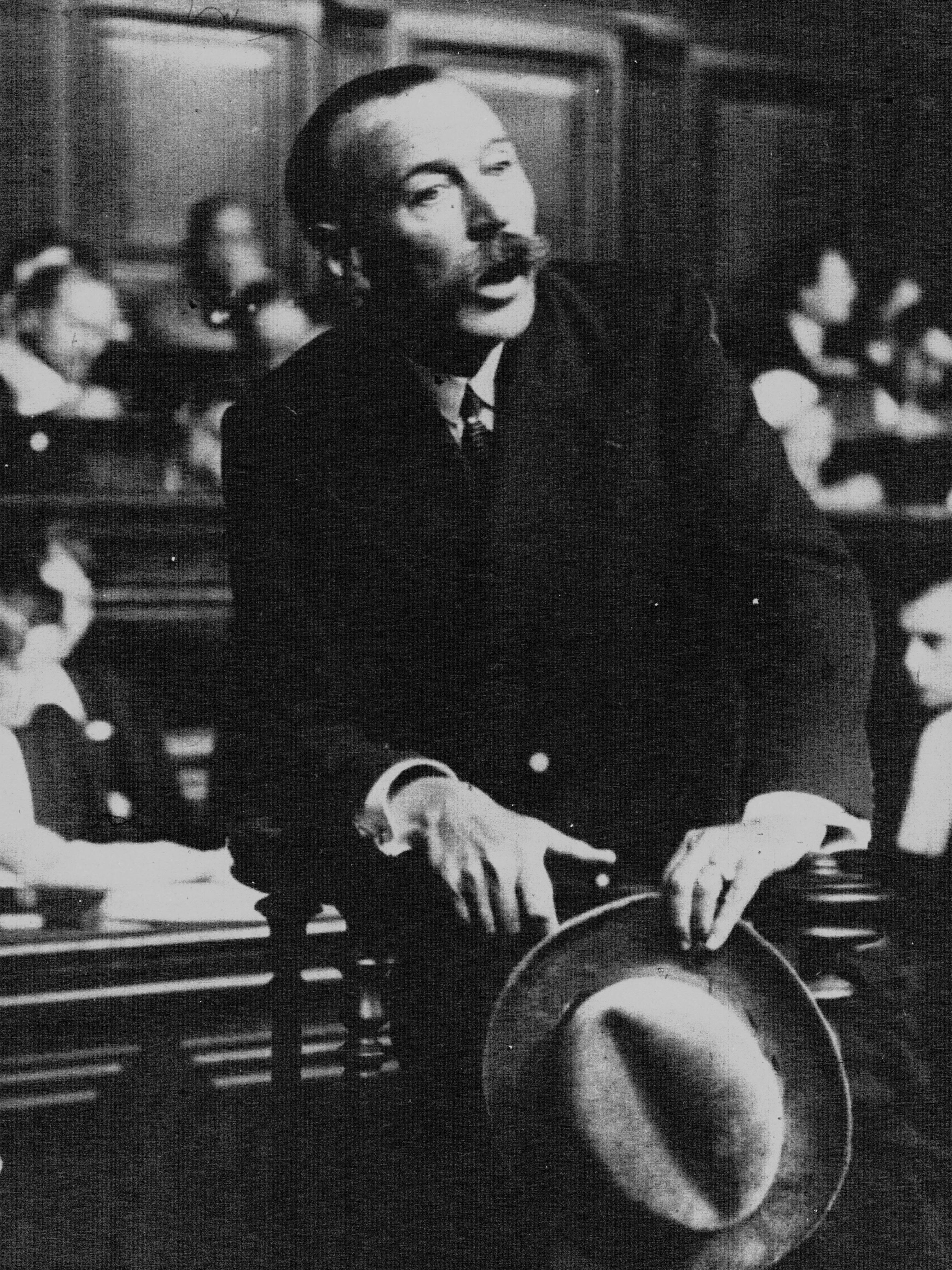 Déposition de Marcel, Ludovic Guillaume en 1932 (né à Épernay le 17 octobre 1872, décédé à Bayeux le 10 février 1963) commissaire divisionnaire. Photographie de presse : Agence Mondial (Paris)